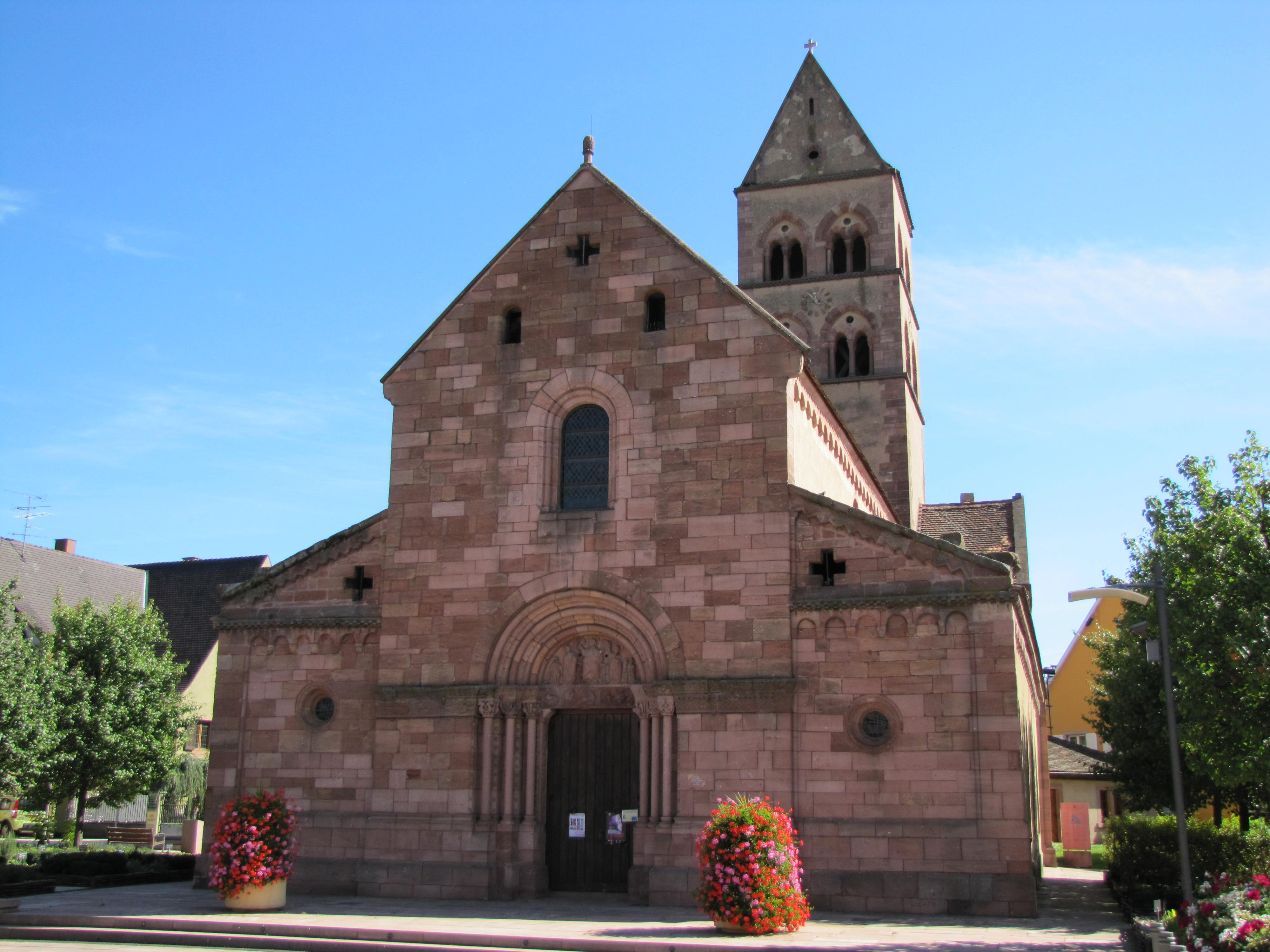 Alsace, Haut-Rhin, Église Saints-Pierre et Paul de Sigolsheim (PA00085675, IA68003965).